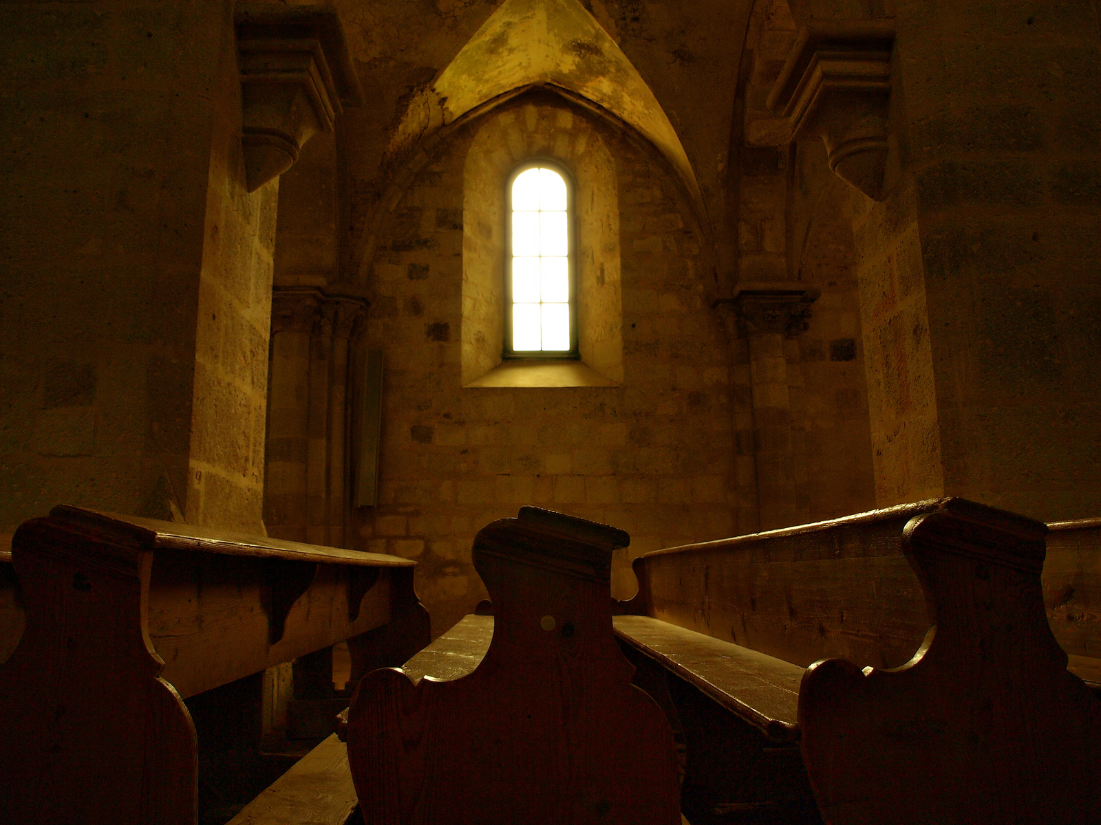 Ciszterci apátsági templom (Nagyboldogasszony) (Bélapátfalva, külterület 0185/1 hrsz. (Bélkő)) This is a photo of a monument in Hungary. Identifier: 5433